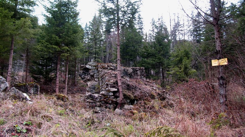 Ruiny Schroniska PTT w dolinie Mołody, 2006